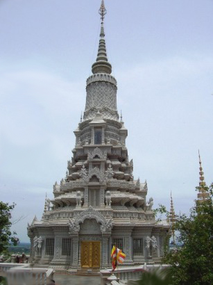 Prang — Oudong.